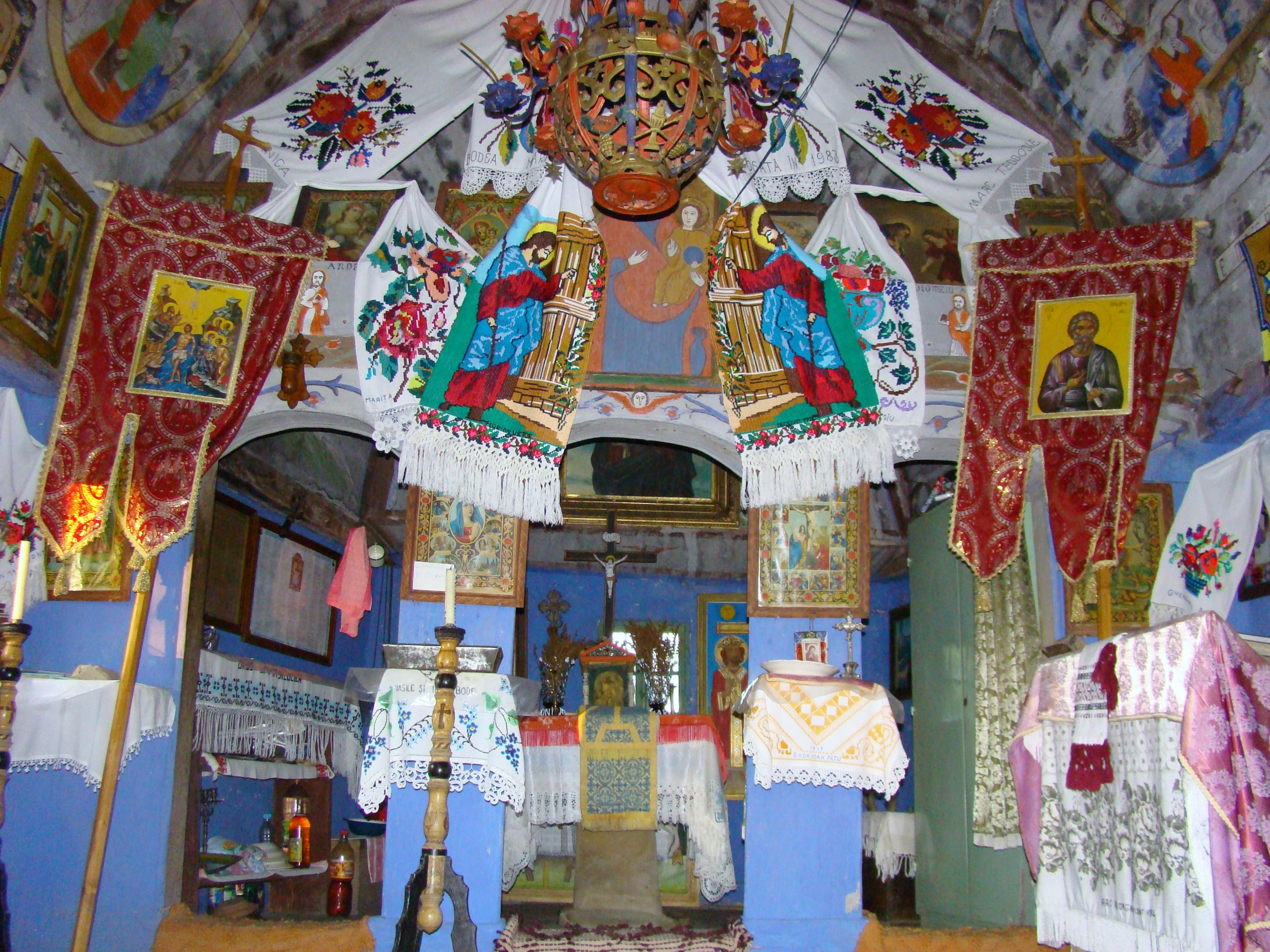 Biserica de lemn "Sfinții Împăraţi" din Aspra